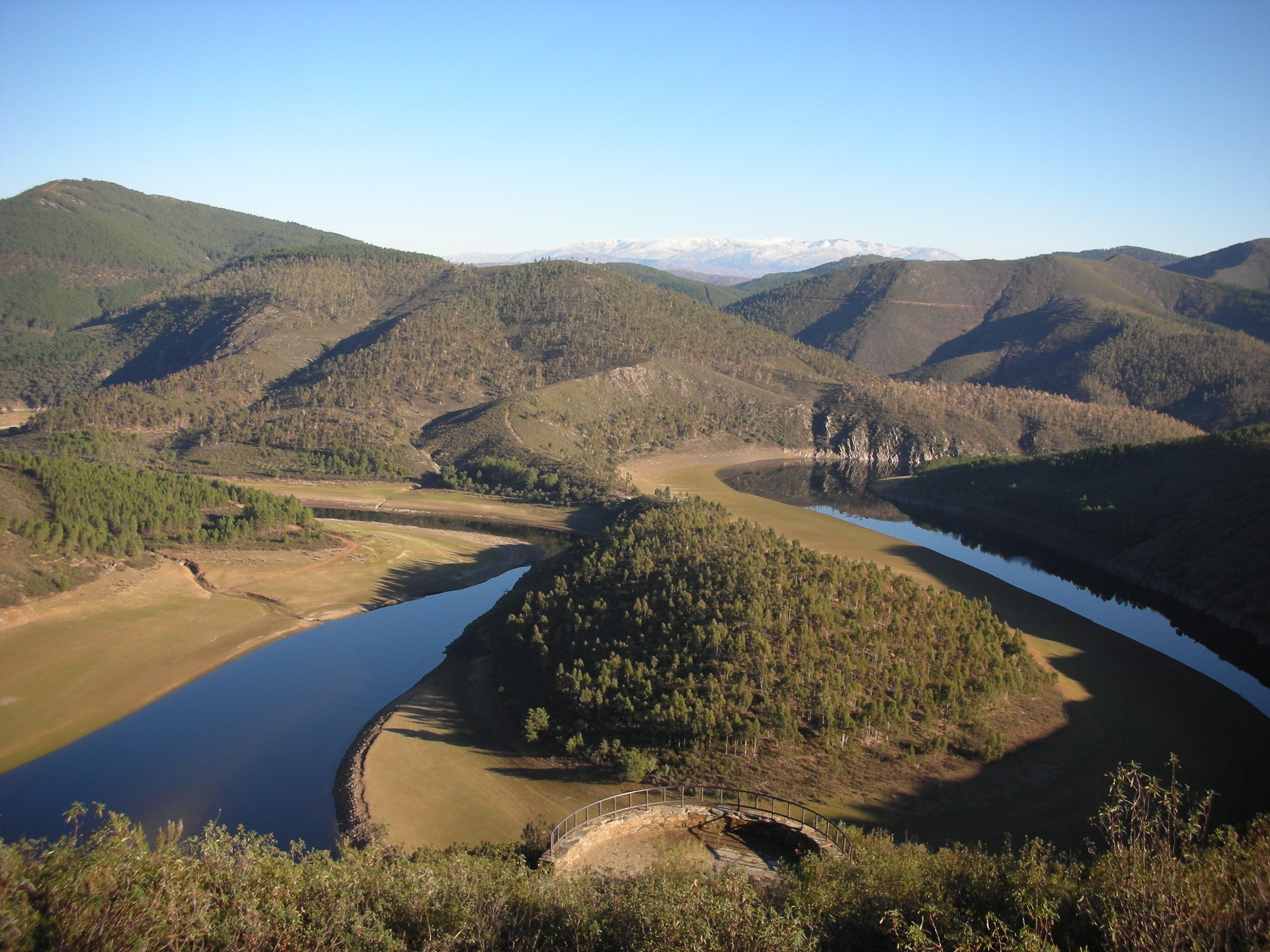 Méandre du Rio Alagon sur la commune de Sotoserrano en Espagne